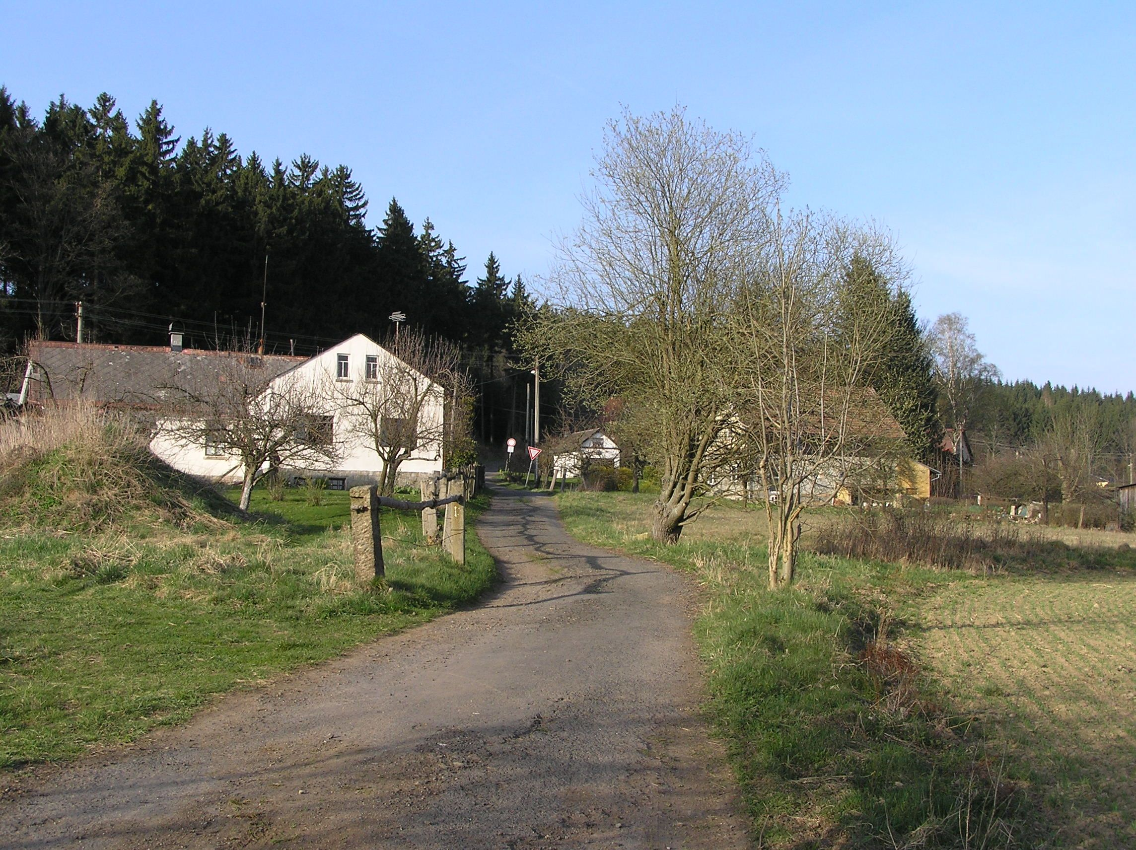 Dolní Dobrá Voda - část Rychnova u Jablonce nad Nisou